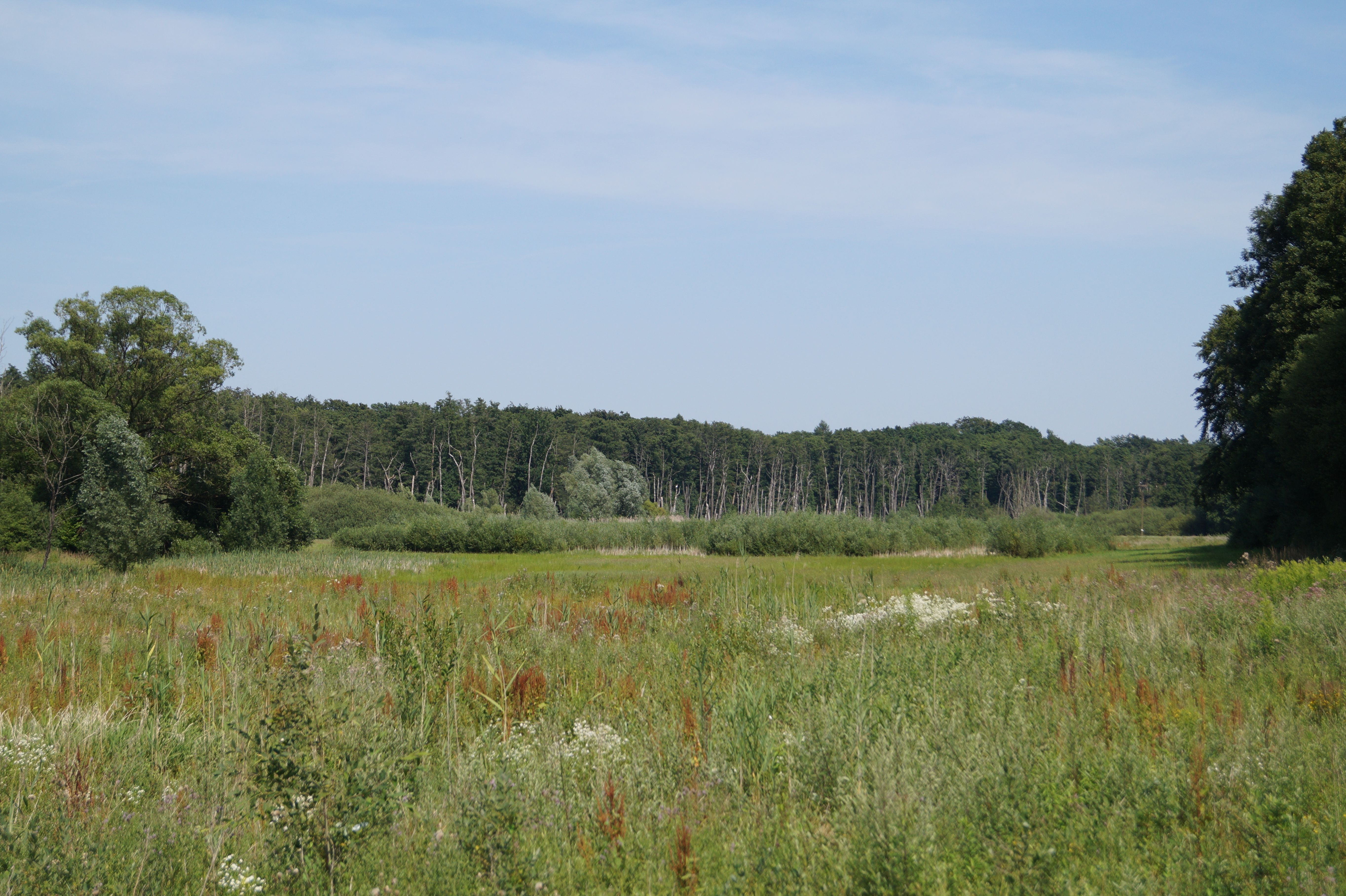 Naturschutzgebiet „Schifflache bei Großauheim“, Großkrotzenburg 2014.